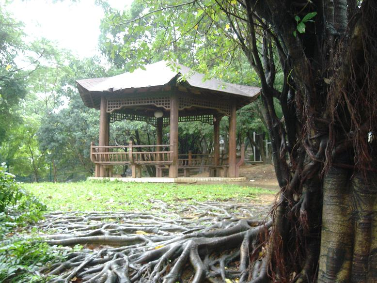 台北縣中和市嘉穗公園環山步道涼亭與大葉雀榕